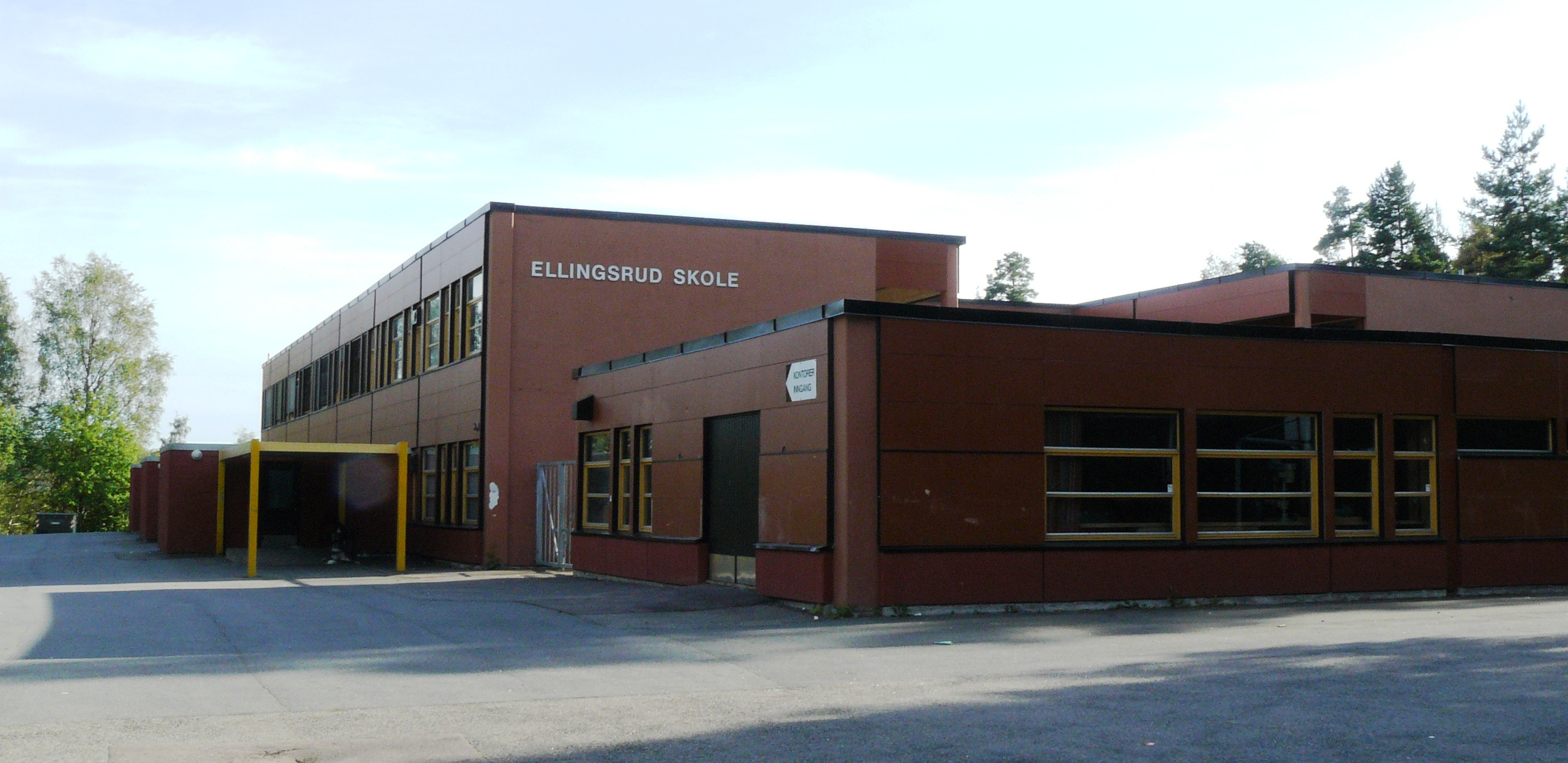 Ellingsrud school, Oslo